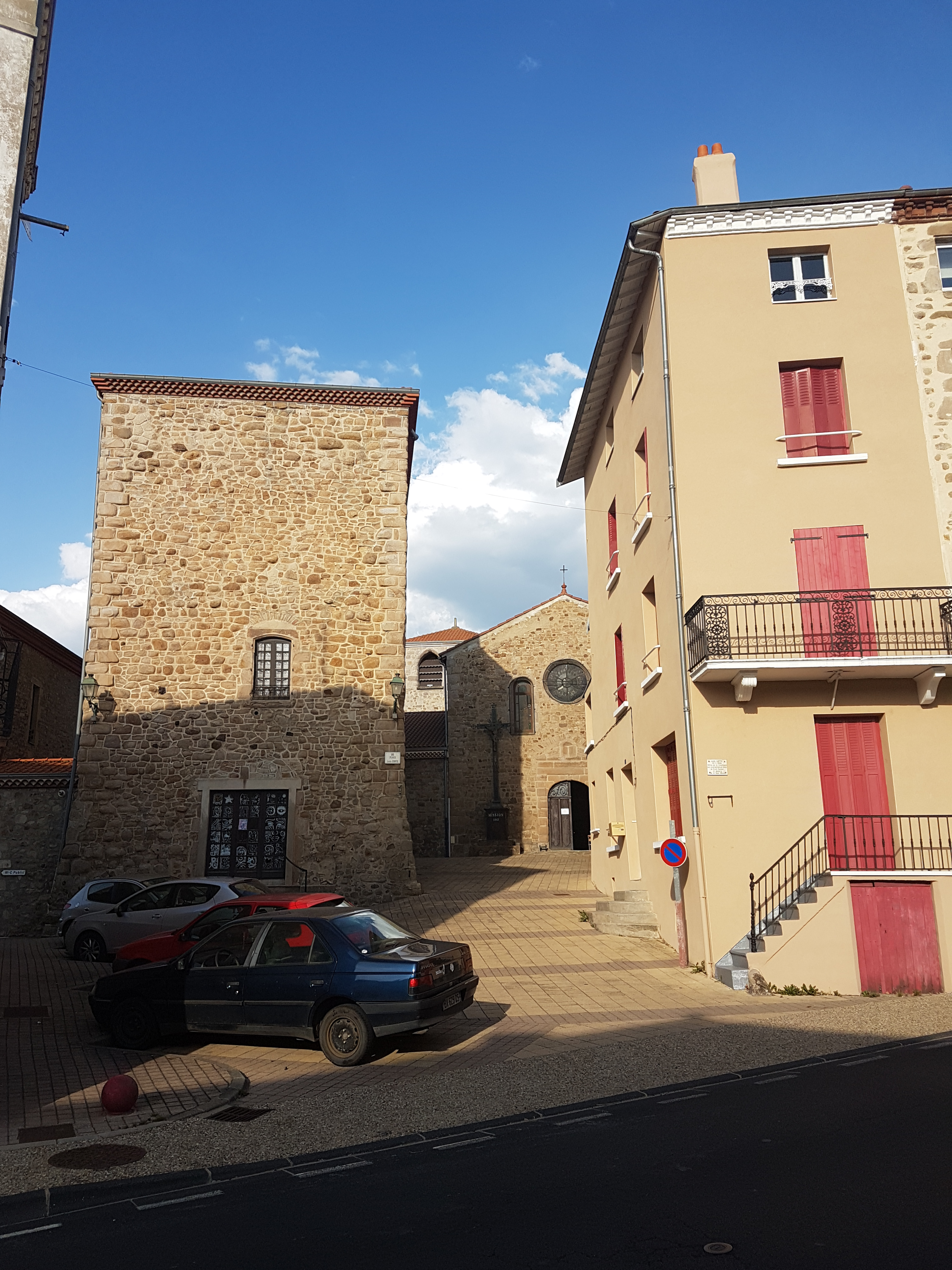 L'église paroissiale de Sainte-Florine et la tour "carrée" vestige des temps médiévaux de la ville fortifiée de Sainte-Florine